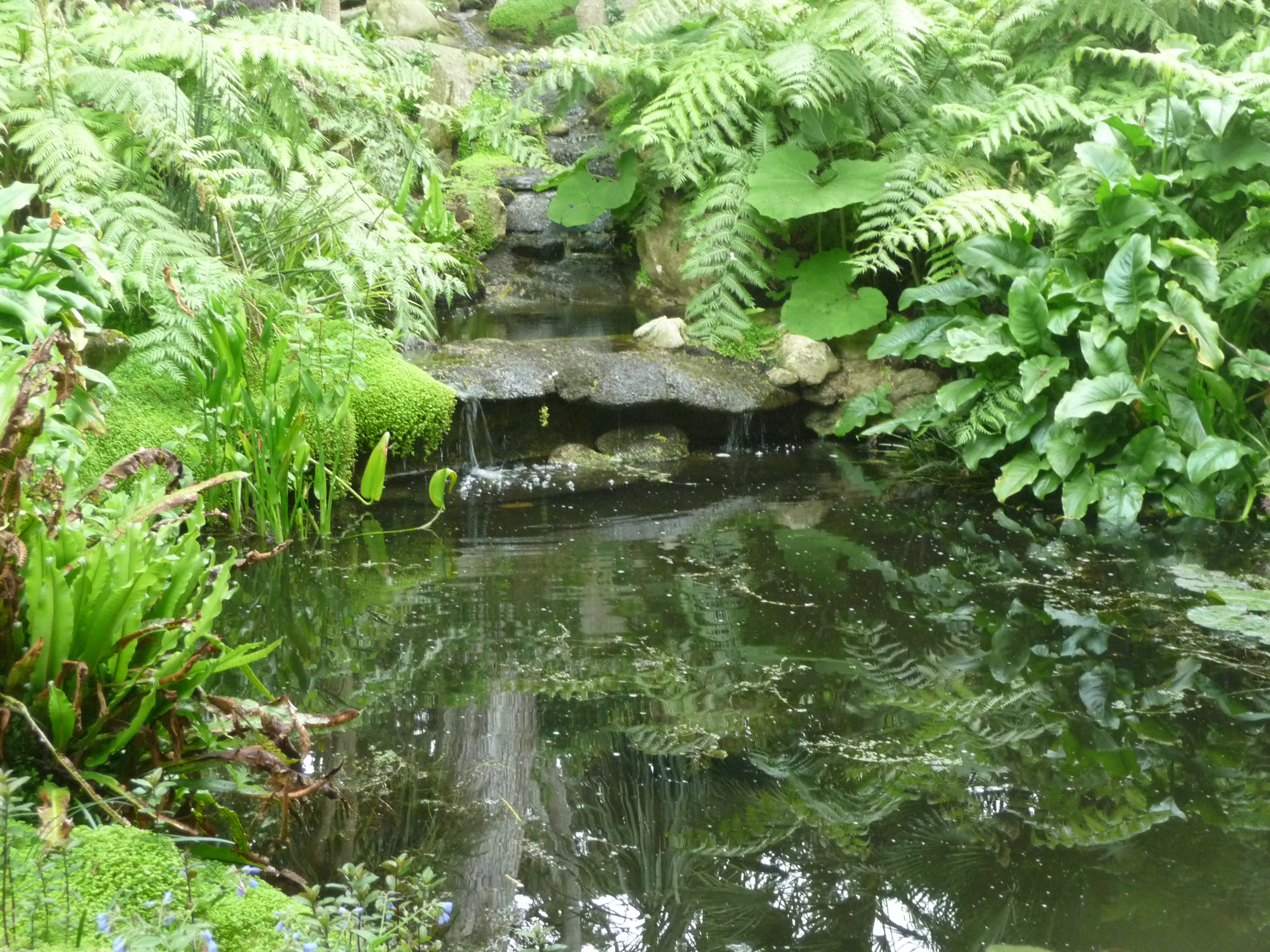 Île de Batz : jardin Georges Delaselle, cascade et étang